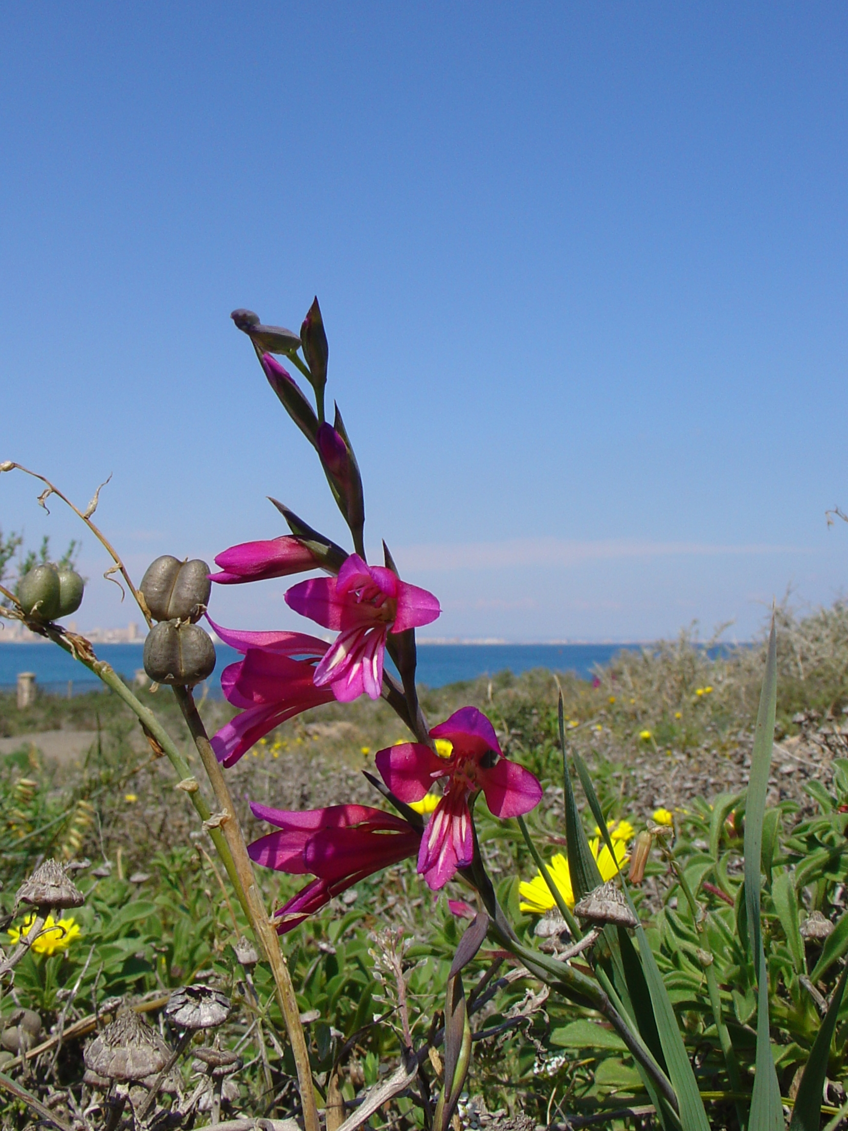 Gladiolus illyricus from Cabo de Palos, Murcia, Spain